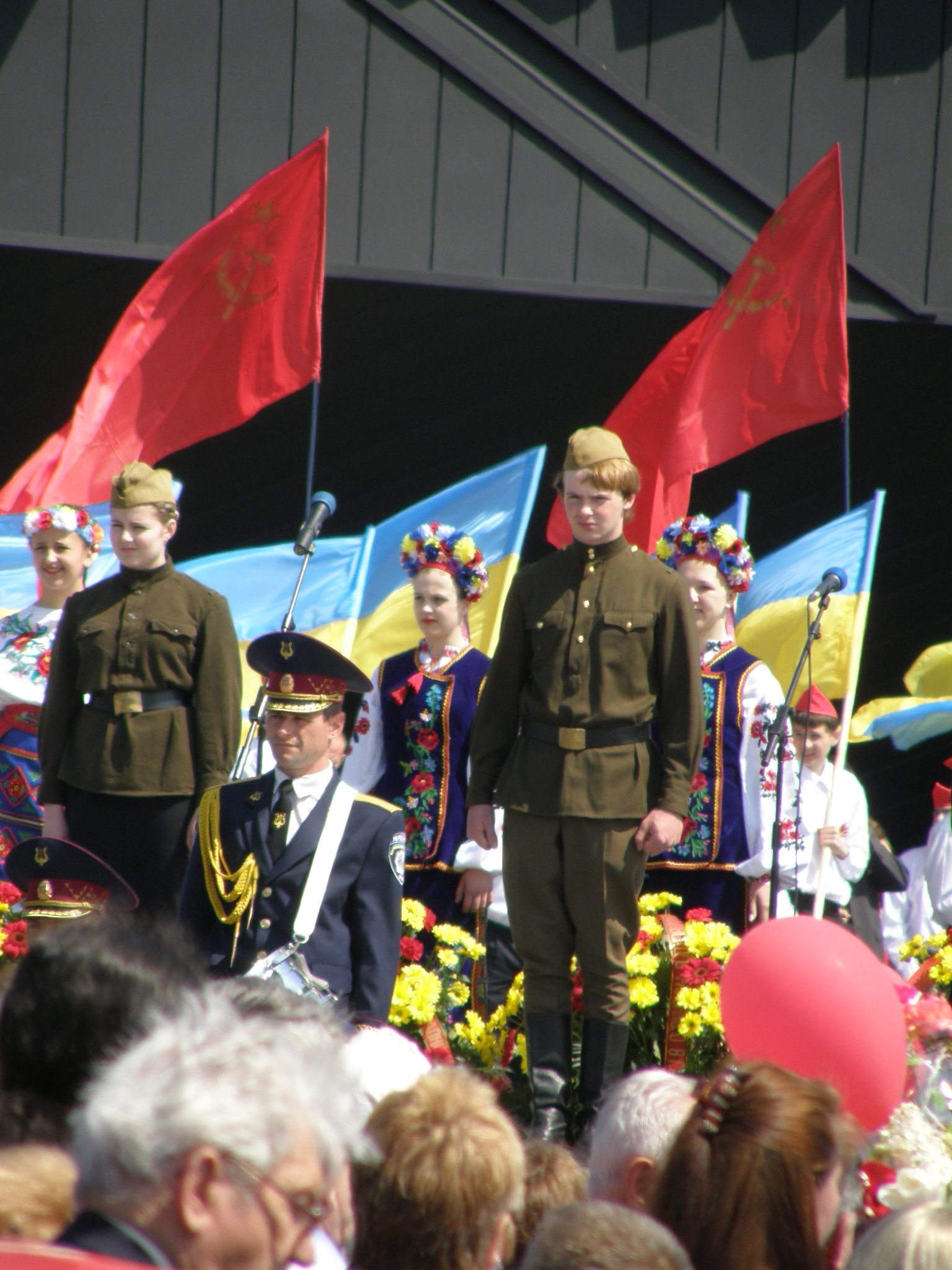 Донецк. Парк Ленинского комсомола. Празднование Дня Победы.